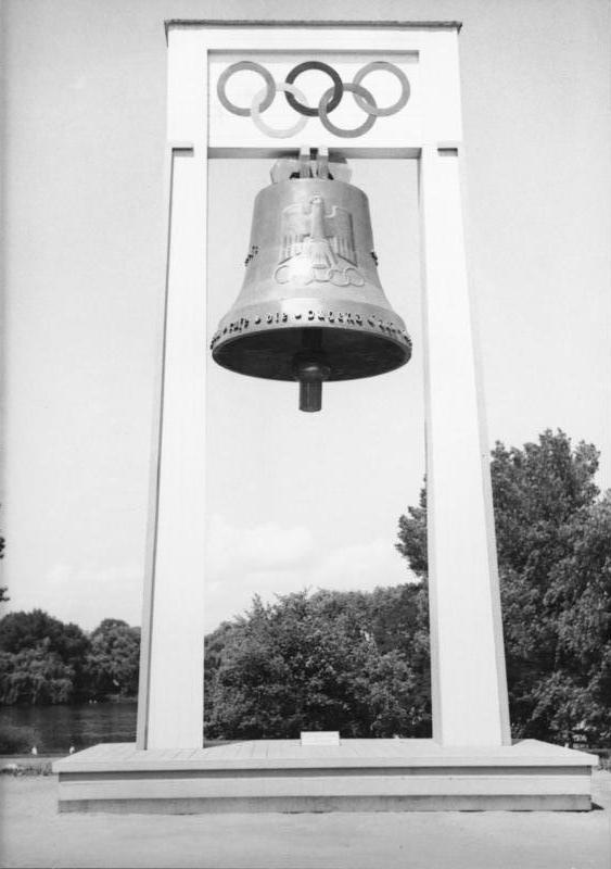 Berlin - Olympiade 1936 Olympia-Glocke in Weissensee